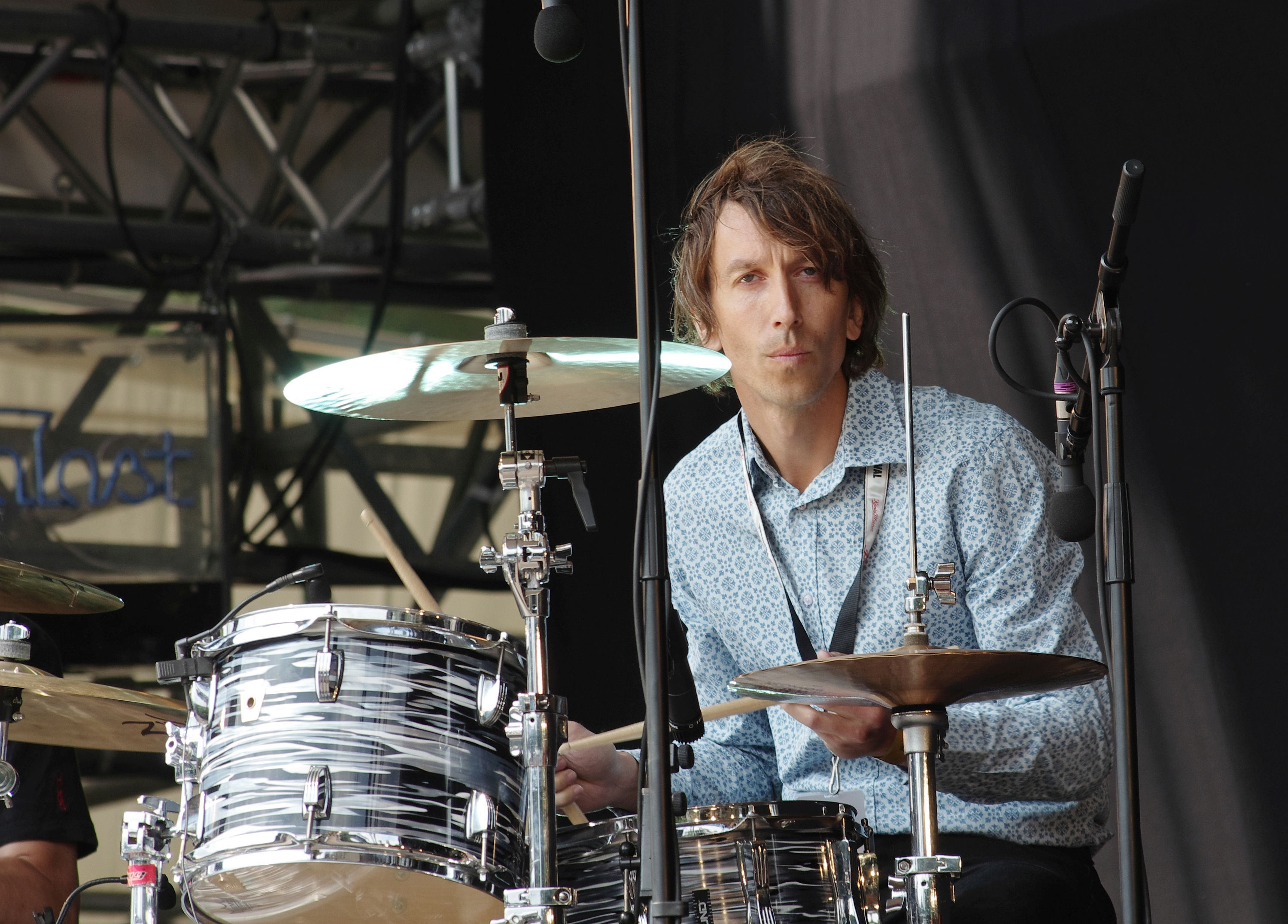 Staffan Ljunggren, Schlagzeuger des schwedischen Duos Trummor & Orgel beim Haldern Pop Festival 2013